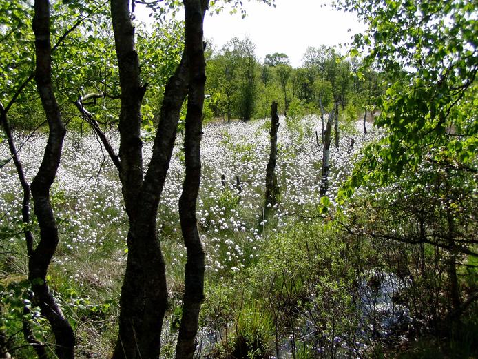 Naturschutzgebiet Stoteler Moor (Teil des Naturschutzgebiets „Hahnenknooper Moore“), Feuchtgebiet mit Wollgras und Torfmoose. Birken sterben ab.